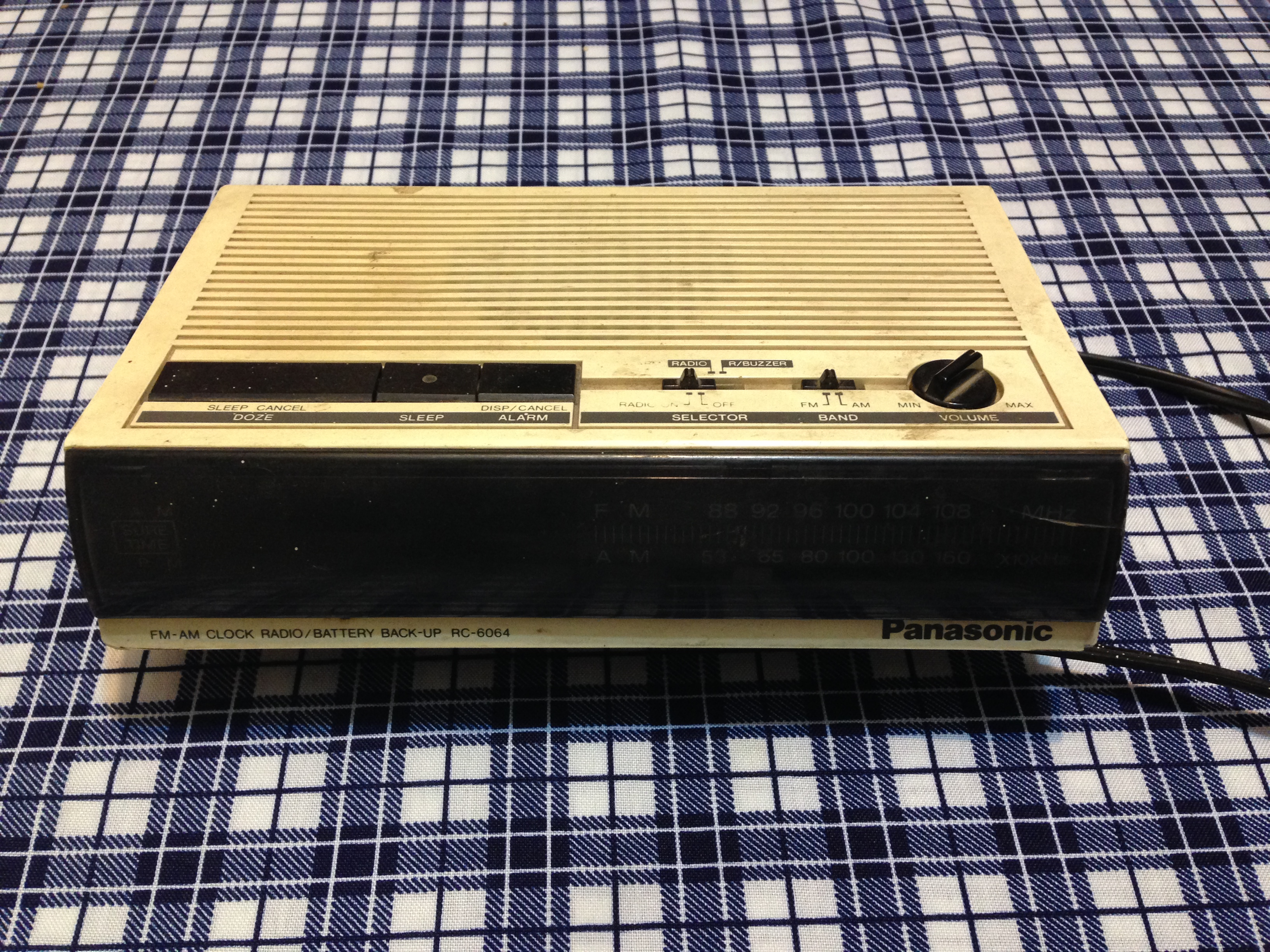 radio fm